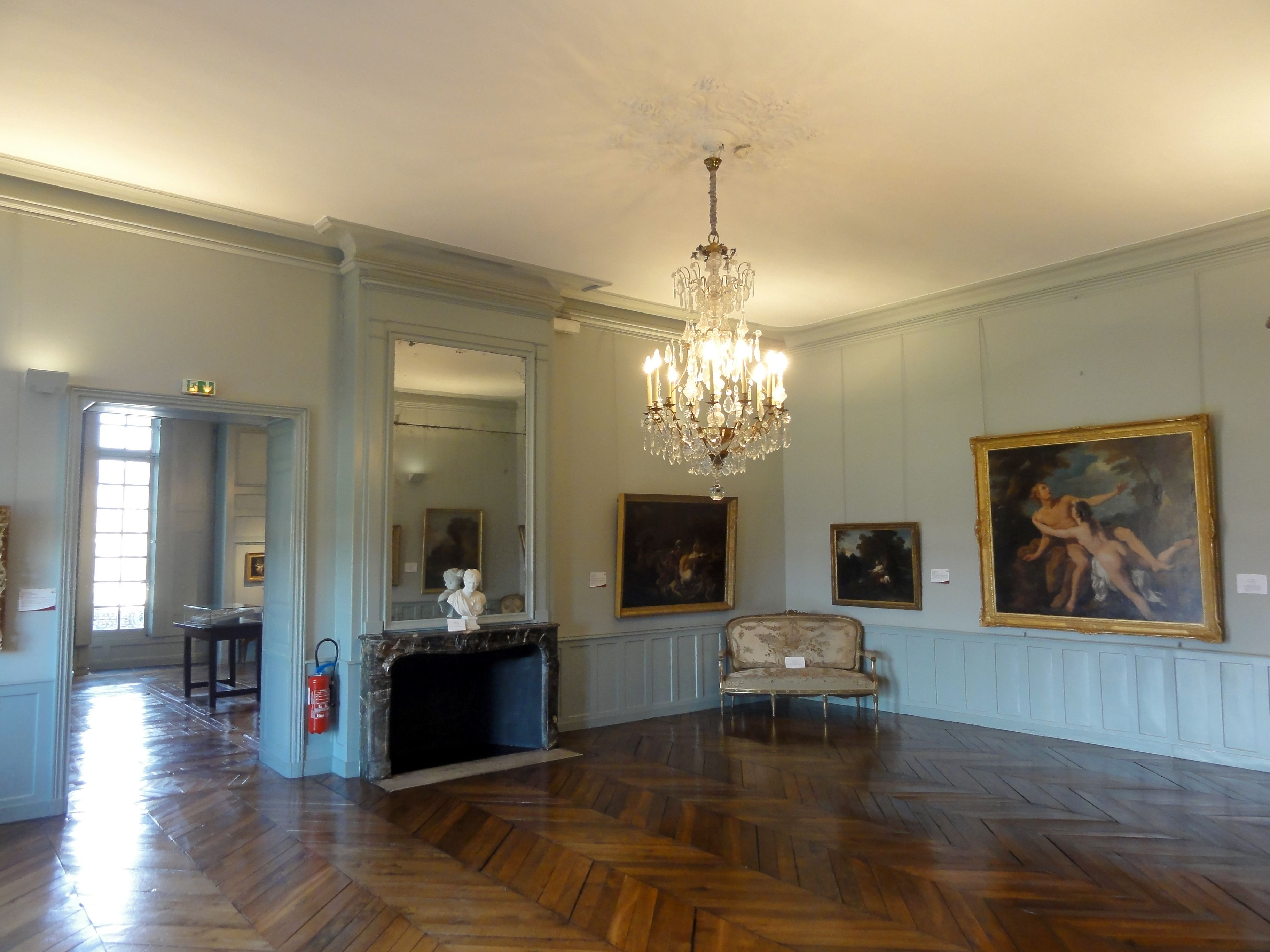 Antichambre.